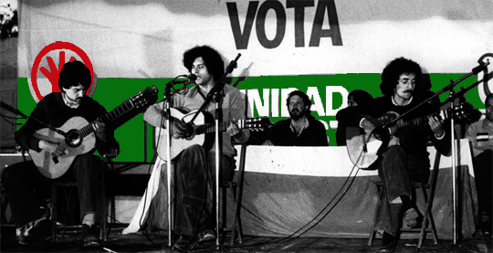 campaña 1978